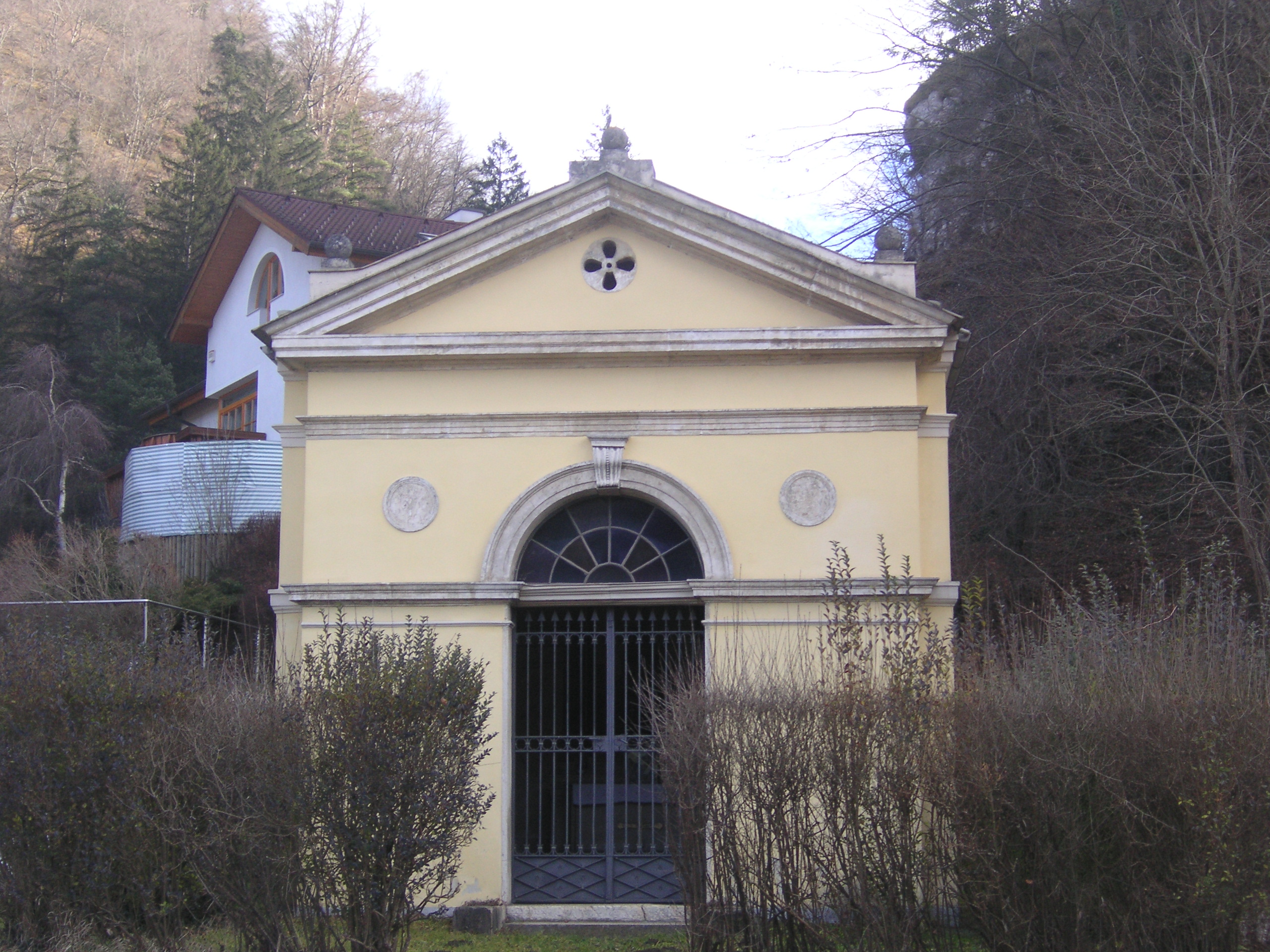 Ferdinandskapelle (Gedächtniskapelle)